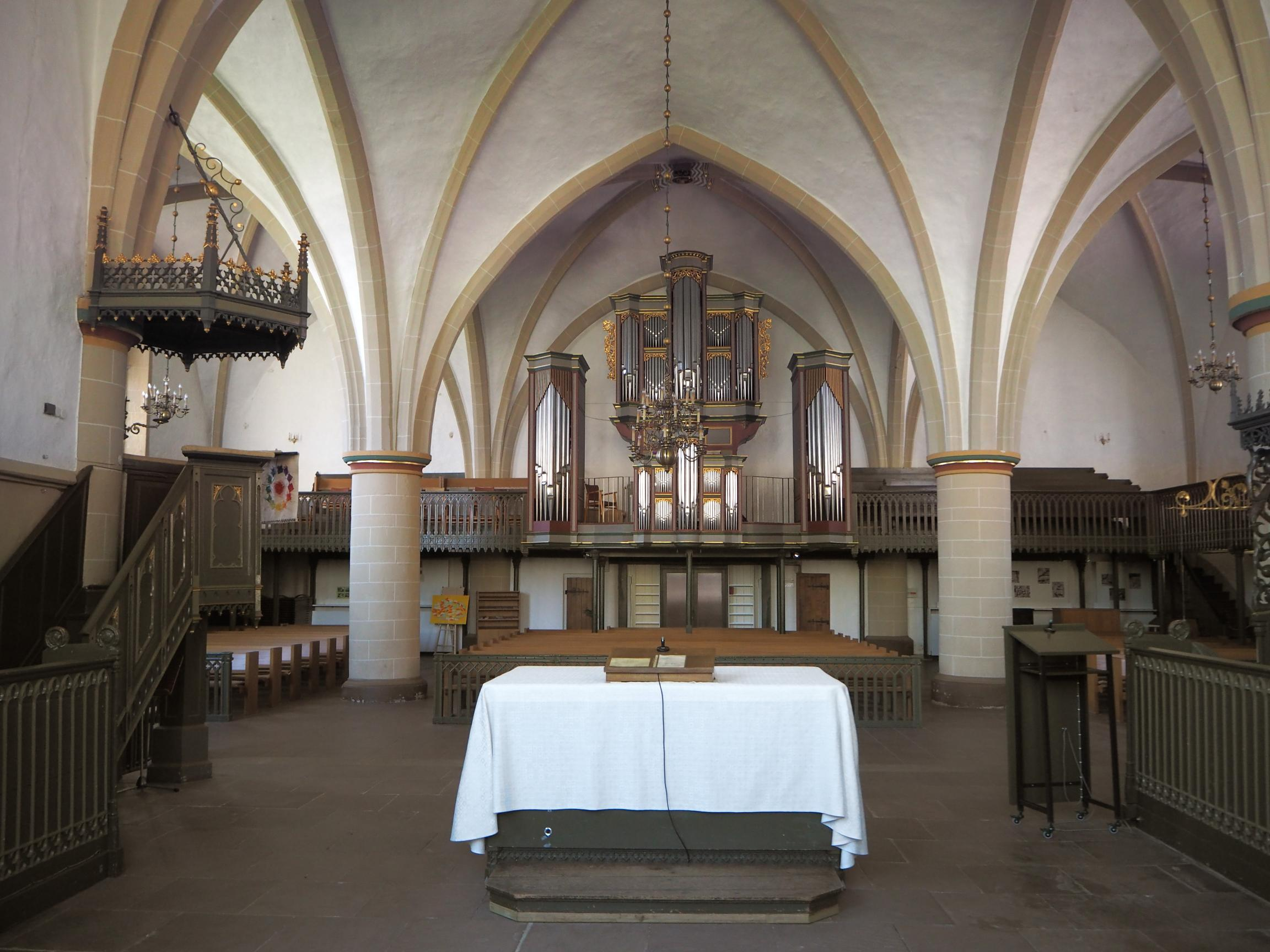 Horn (Horn-Bad Meinberg), Reformierte Stadtkirche, Innenraum nach Westen, Foto: April 2015